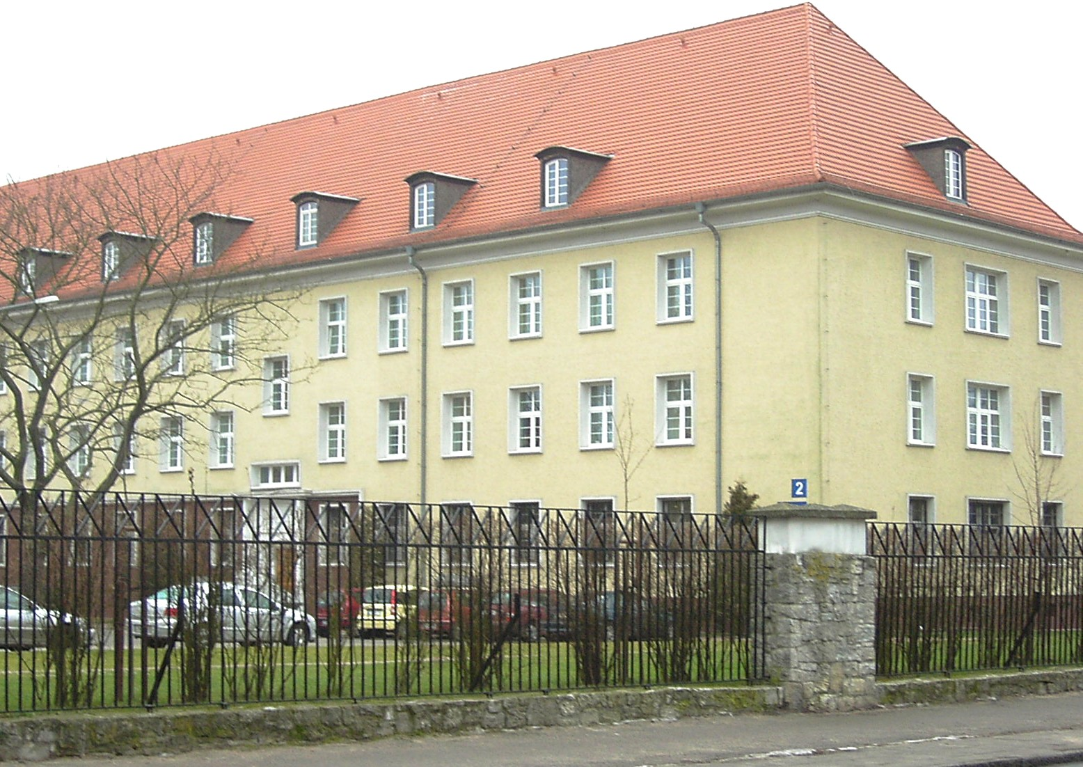 Koszary przy ul Łukasińskiego w Szczecinie